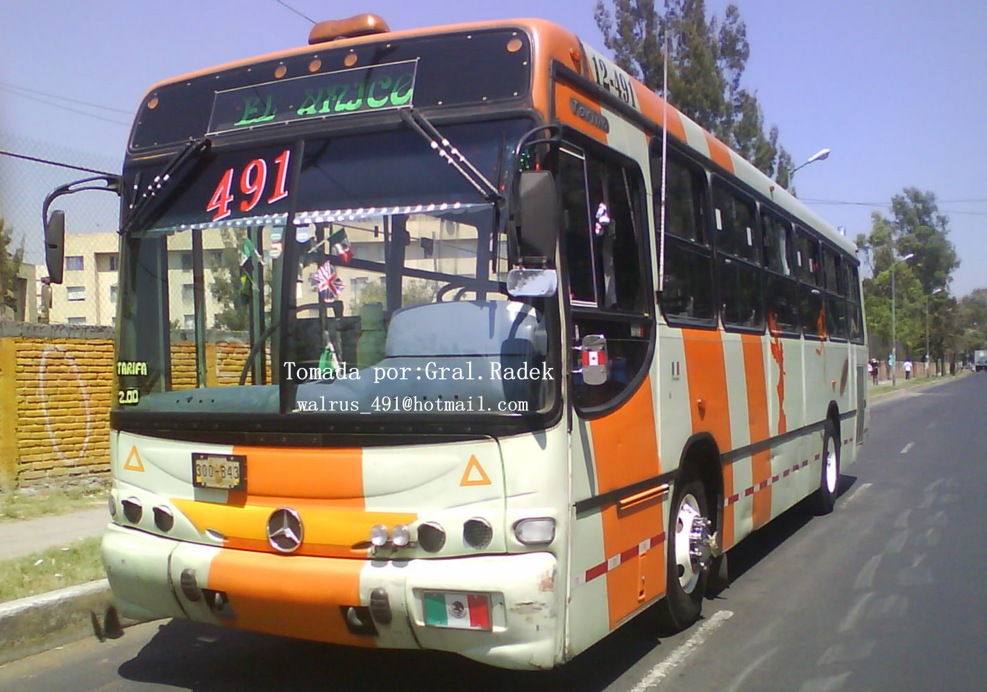 Marcopolo Torino 12-491 EL UNICO AUOBUS DE LA RED DE TRANSPORTE DE PASAJEROS DL DF MODELO 2002.